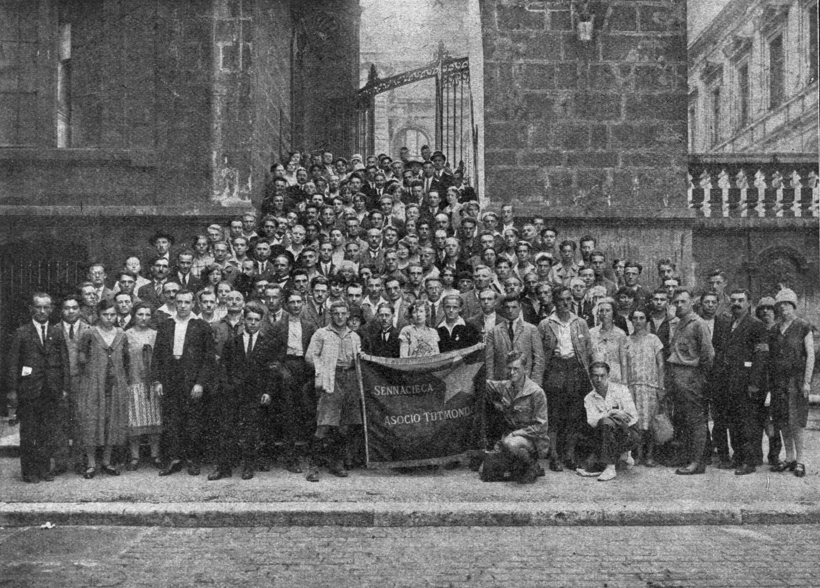 SAT-Kongreso 1927 en Liono. Komuna foto de la partoprenantoj.